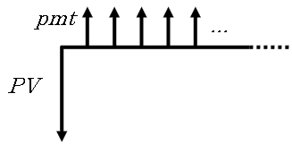 Exemplo de Fluxo Financeiro contendo PV e pmt